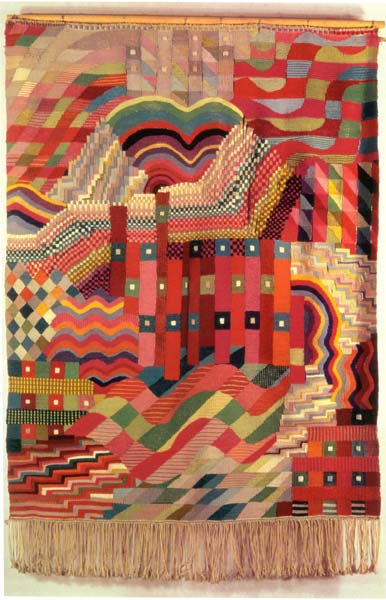 Tapiseria stworzona przez Guntę Stölzl w latach 1927-1928.